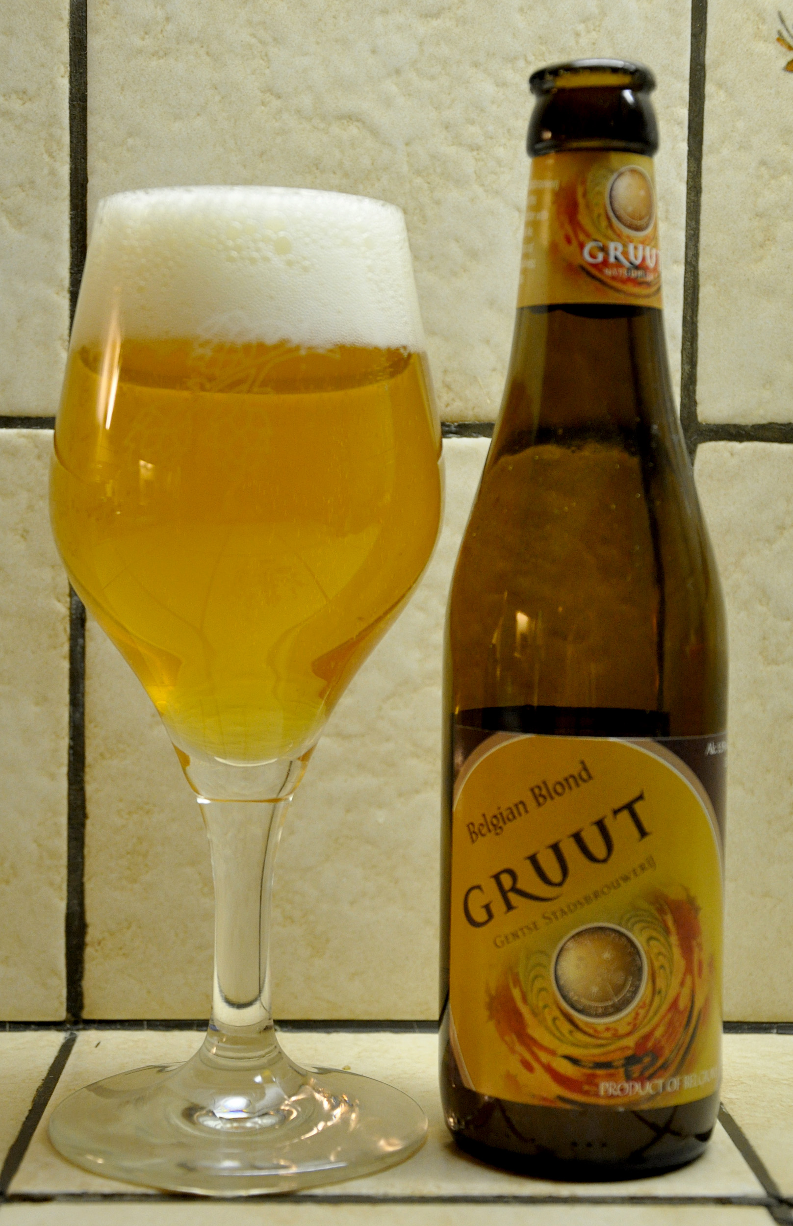 Gruut Blond